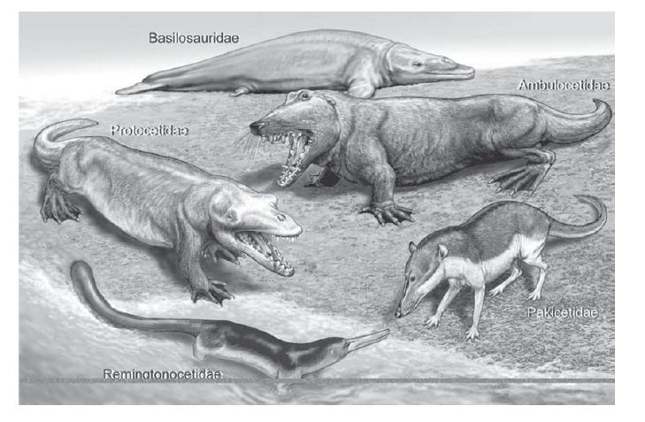 Artigo sobre biologia evolutiva de Ana CLaudia e Charbel Niño, disponível em